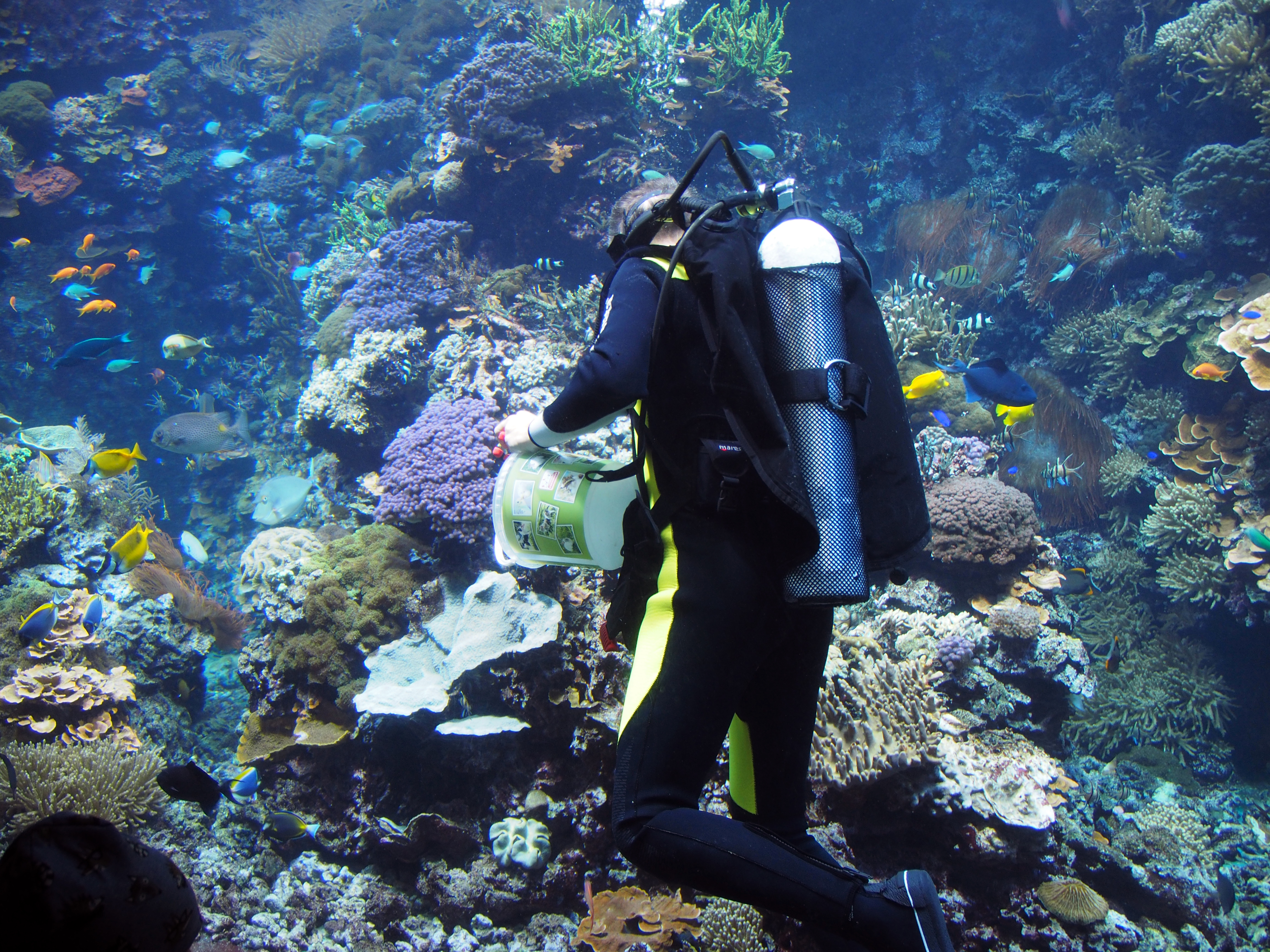 Reinigung des Korallenriffs im Darwineum des Rostocker Zoos